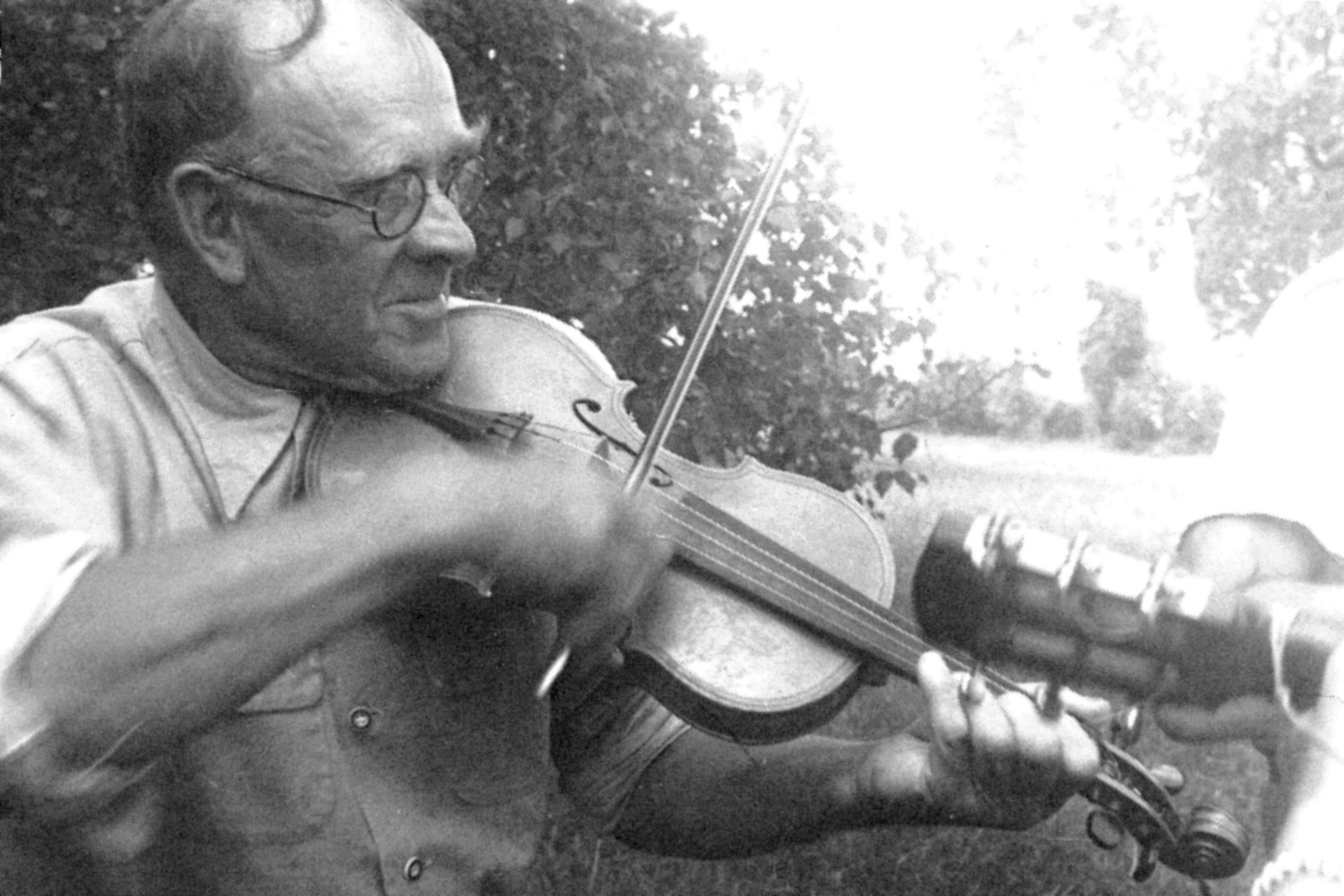 Uno Österman spelar fiol.